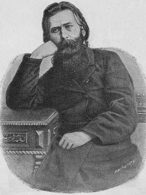 Поэт Иван Захарович Суриков Unknown